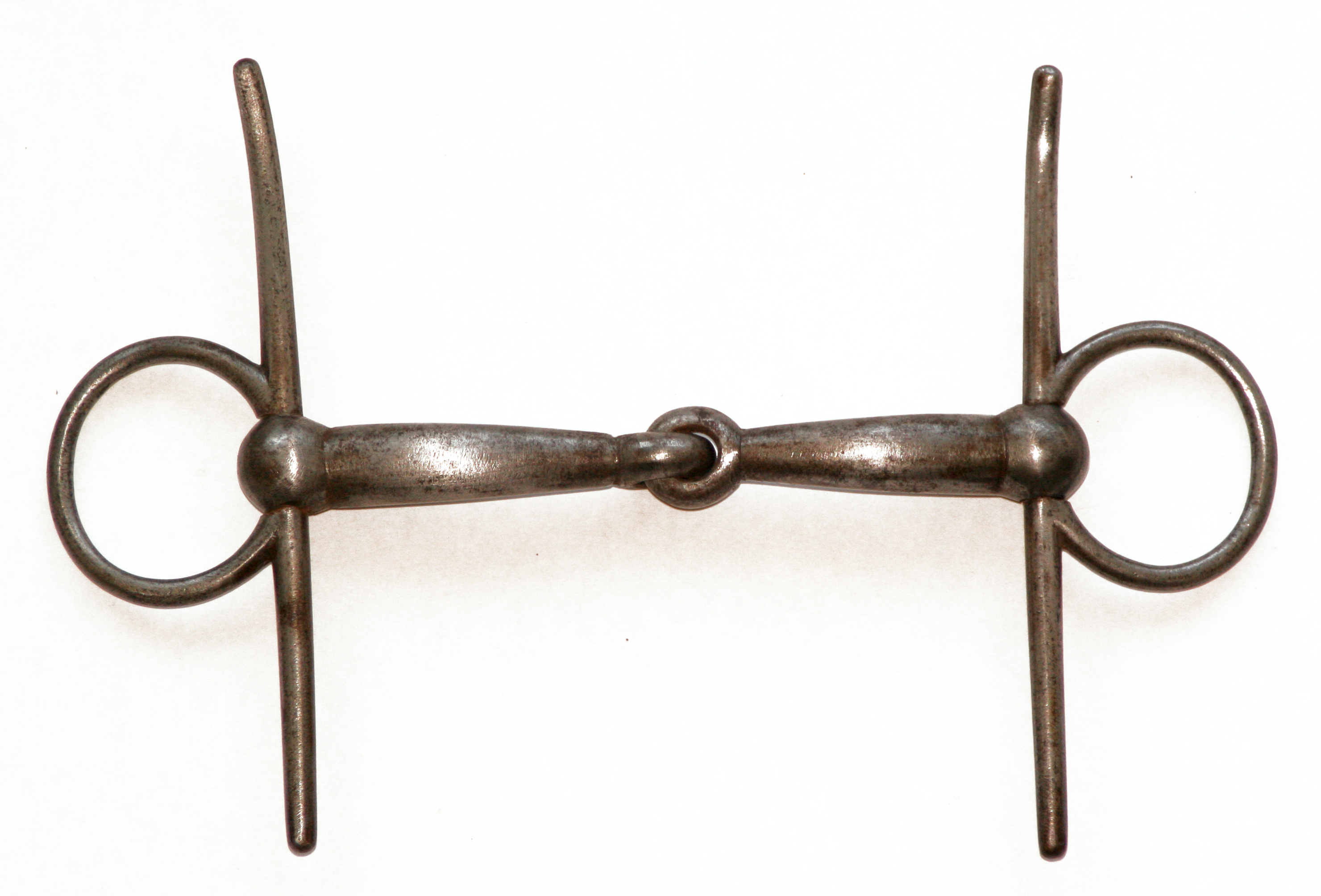 Knebeltreinse gebrochen